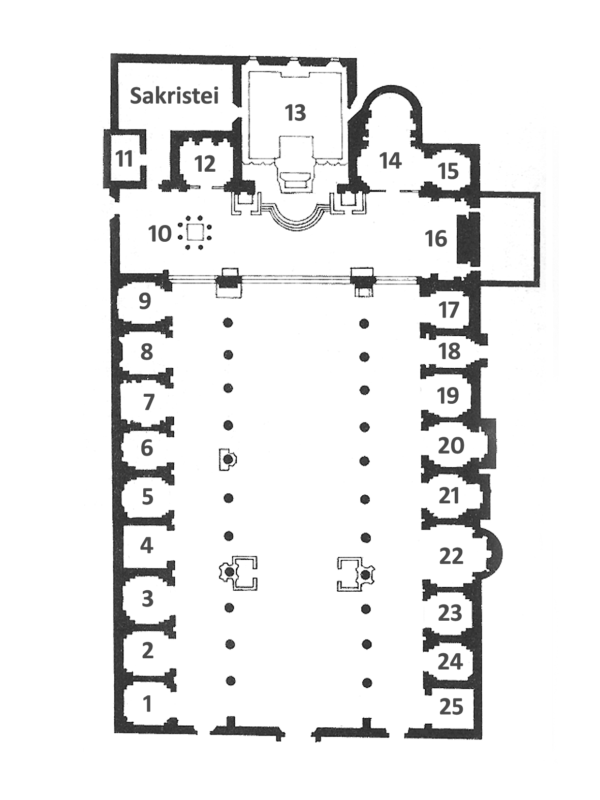 Grundriss der Kirche Santa Maria in Aracoeli in Rom